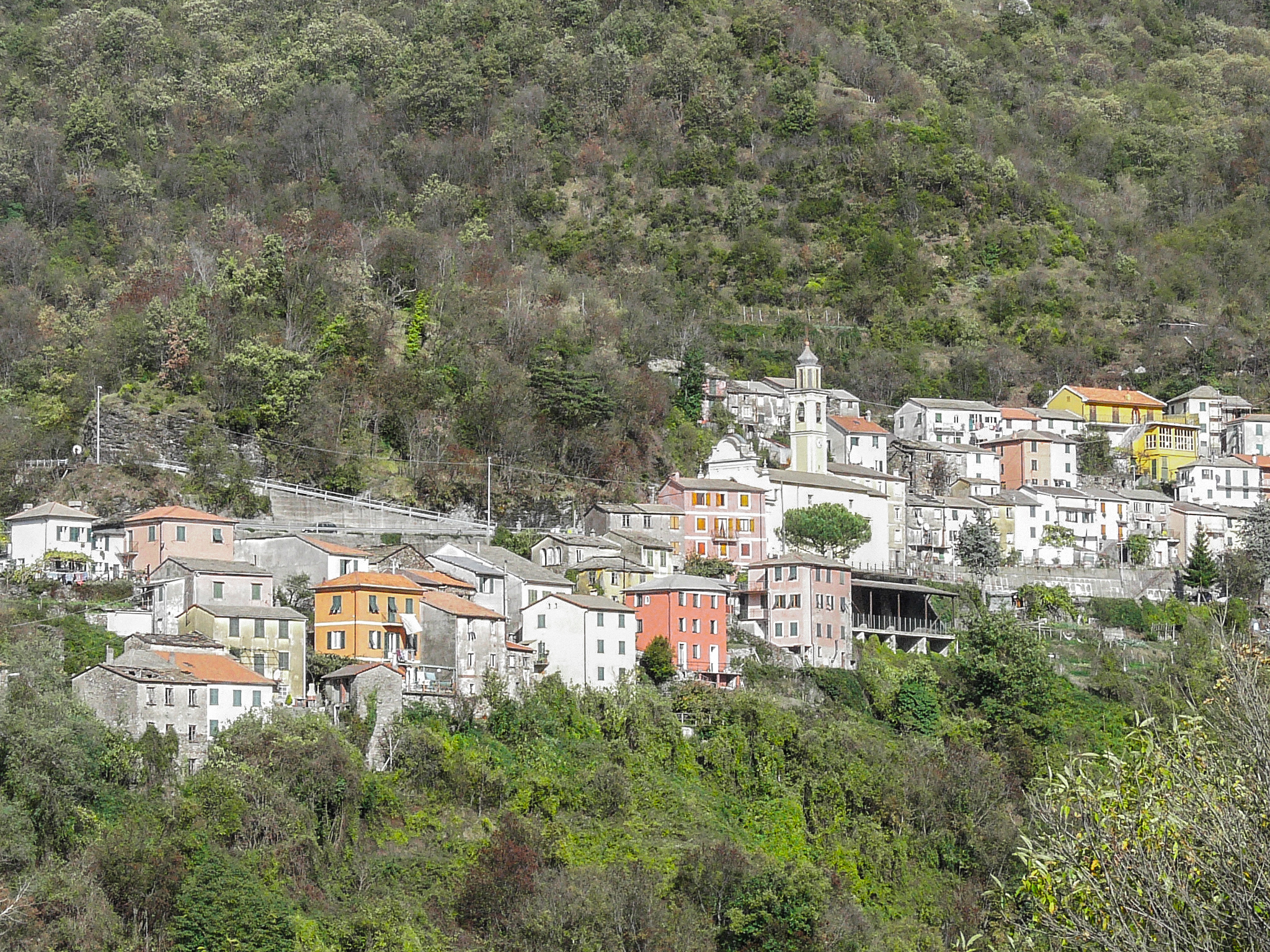 Panorama della frazione di Roccatagliata, Neirone, Liguria, Italia